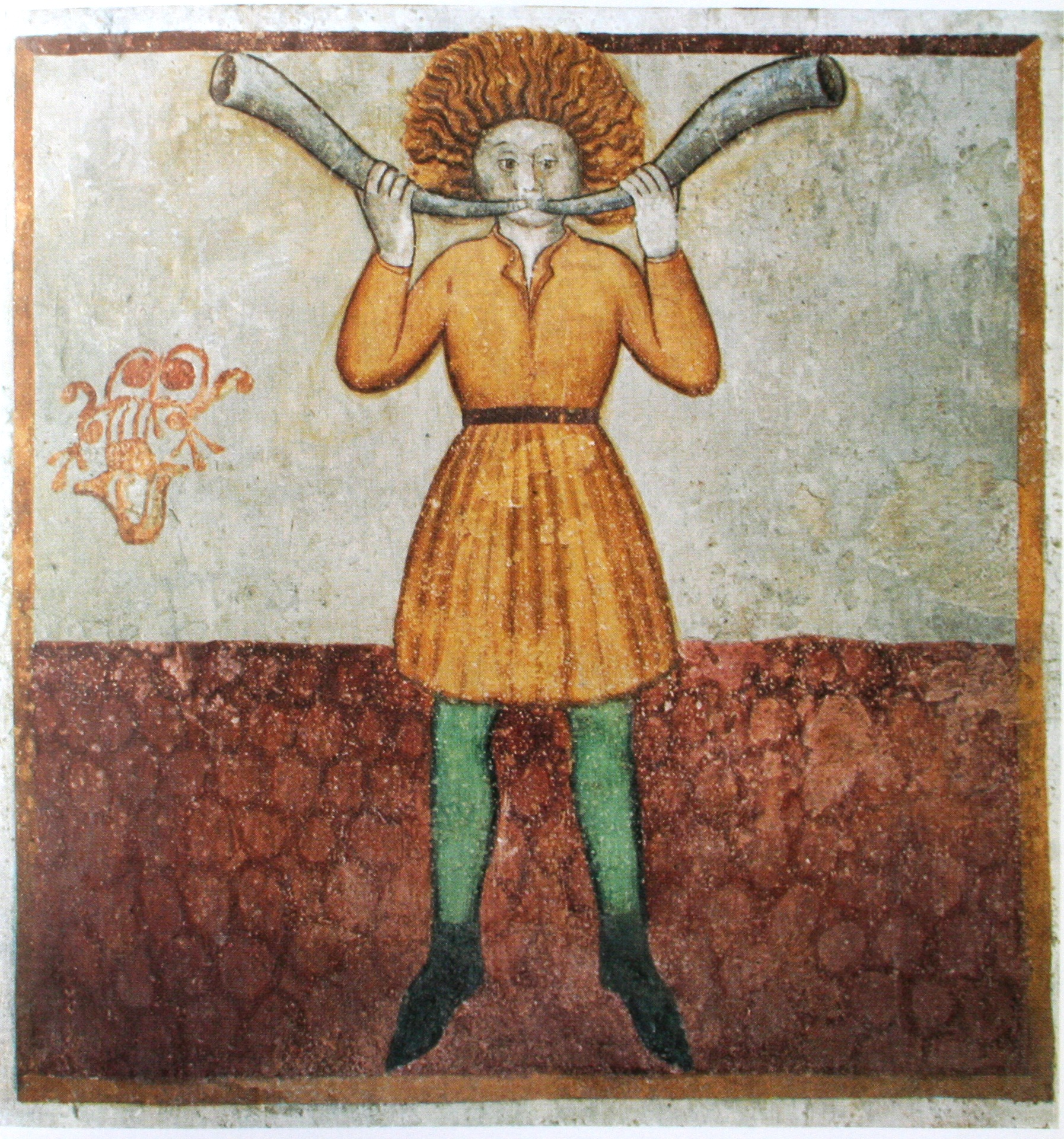 Monatsbilder Kirche Sta Maria del Castello: März